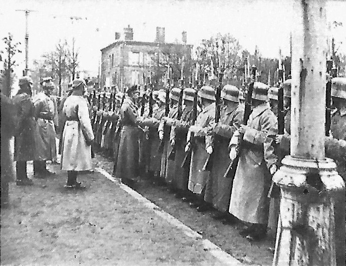 Besichtigung durch den Kronprinzen in Sedan